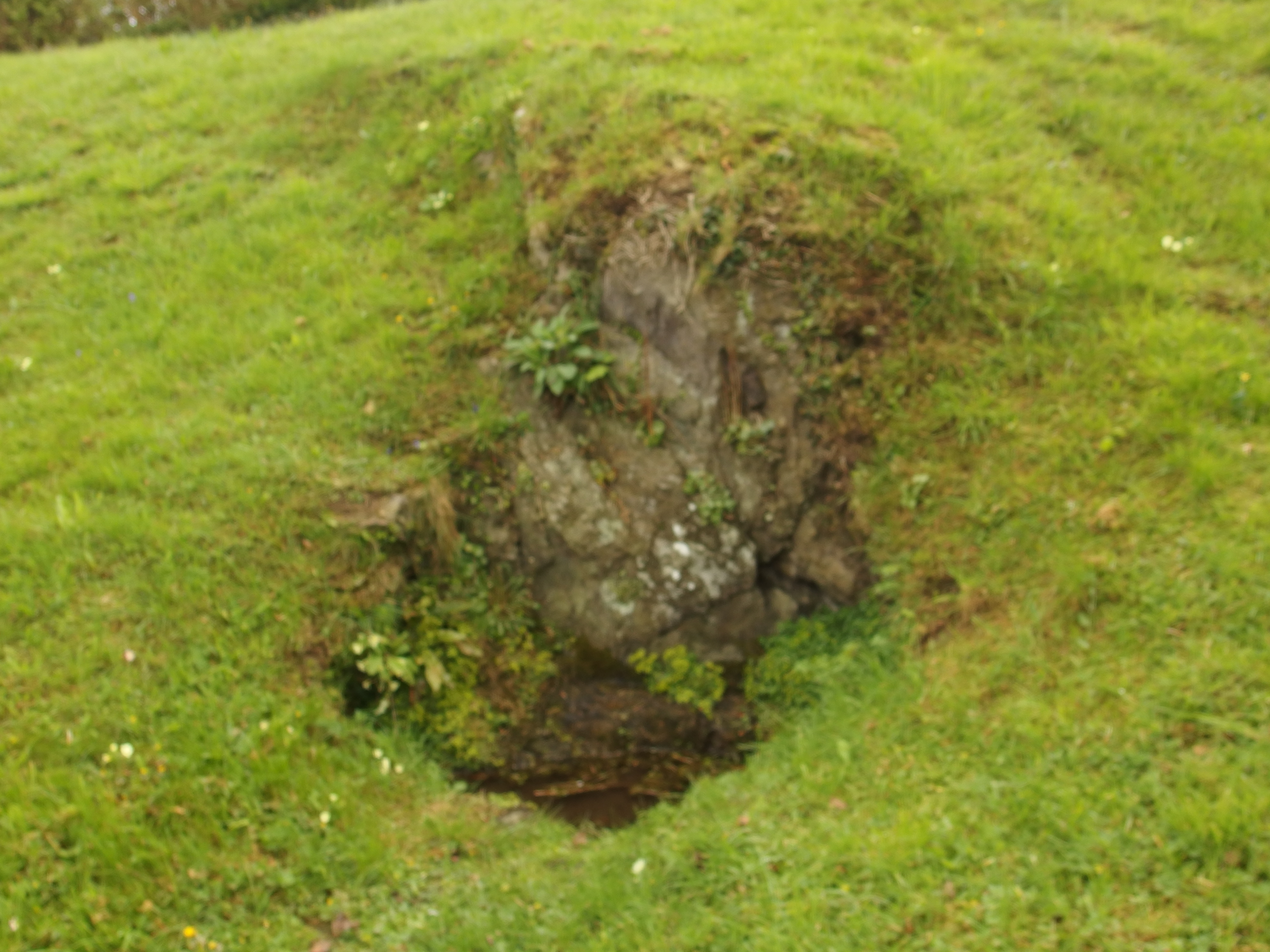 Ffynnon Cerrigceinwen